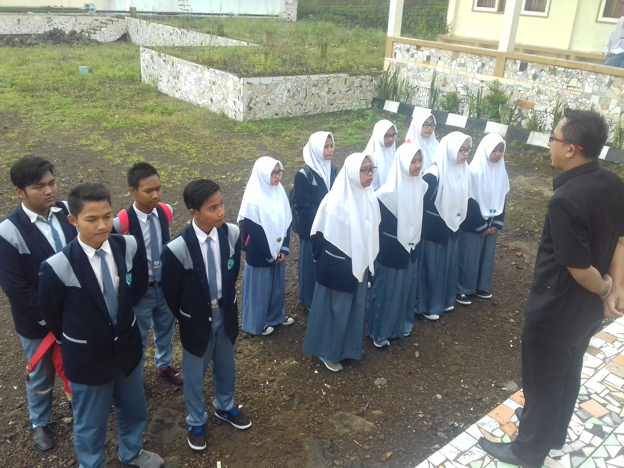 Pelepasan OSN